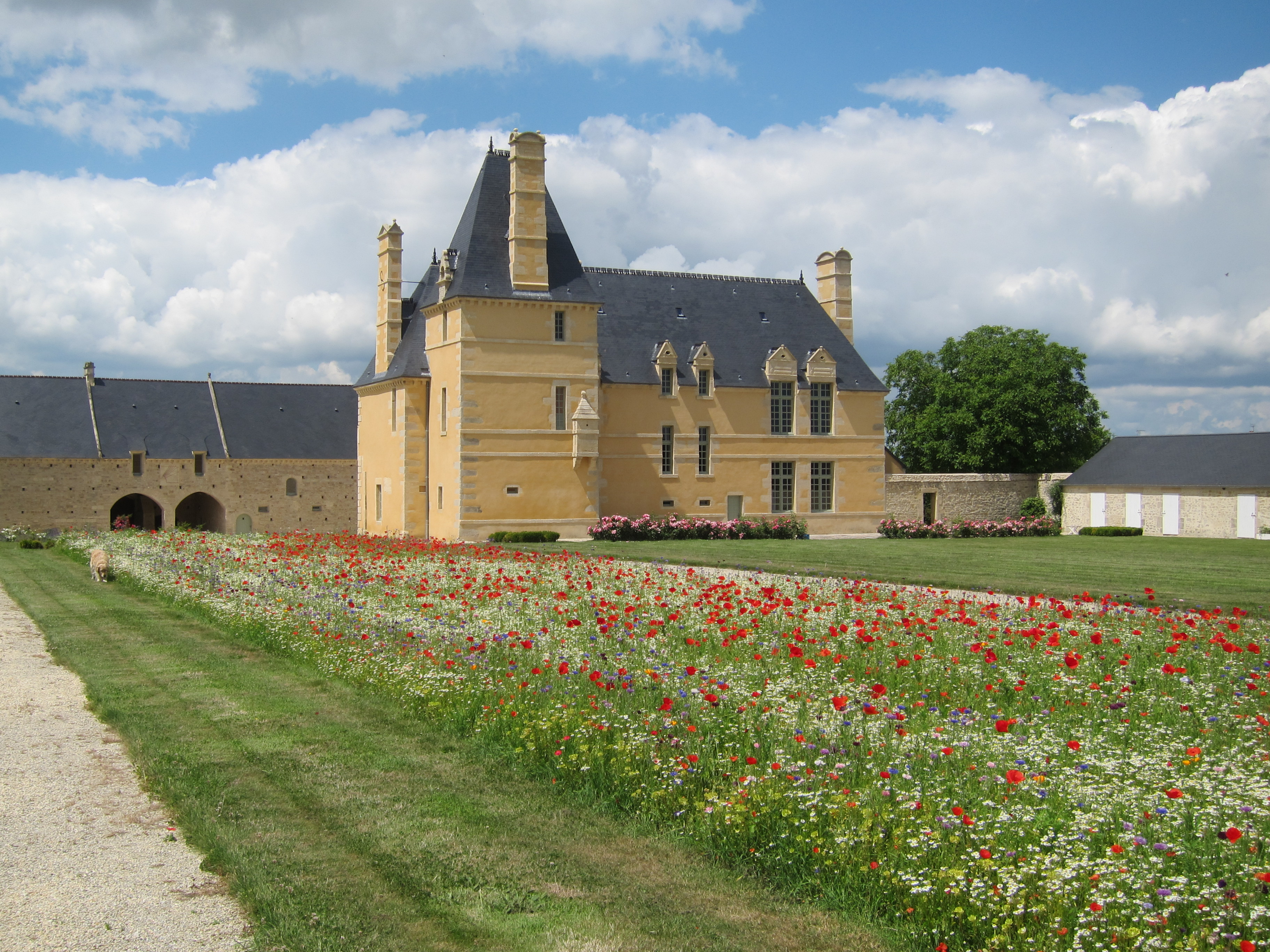 Façade est du Manoir de Cremel